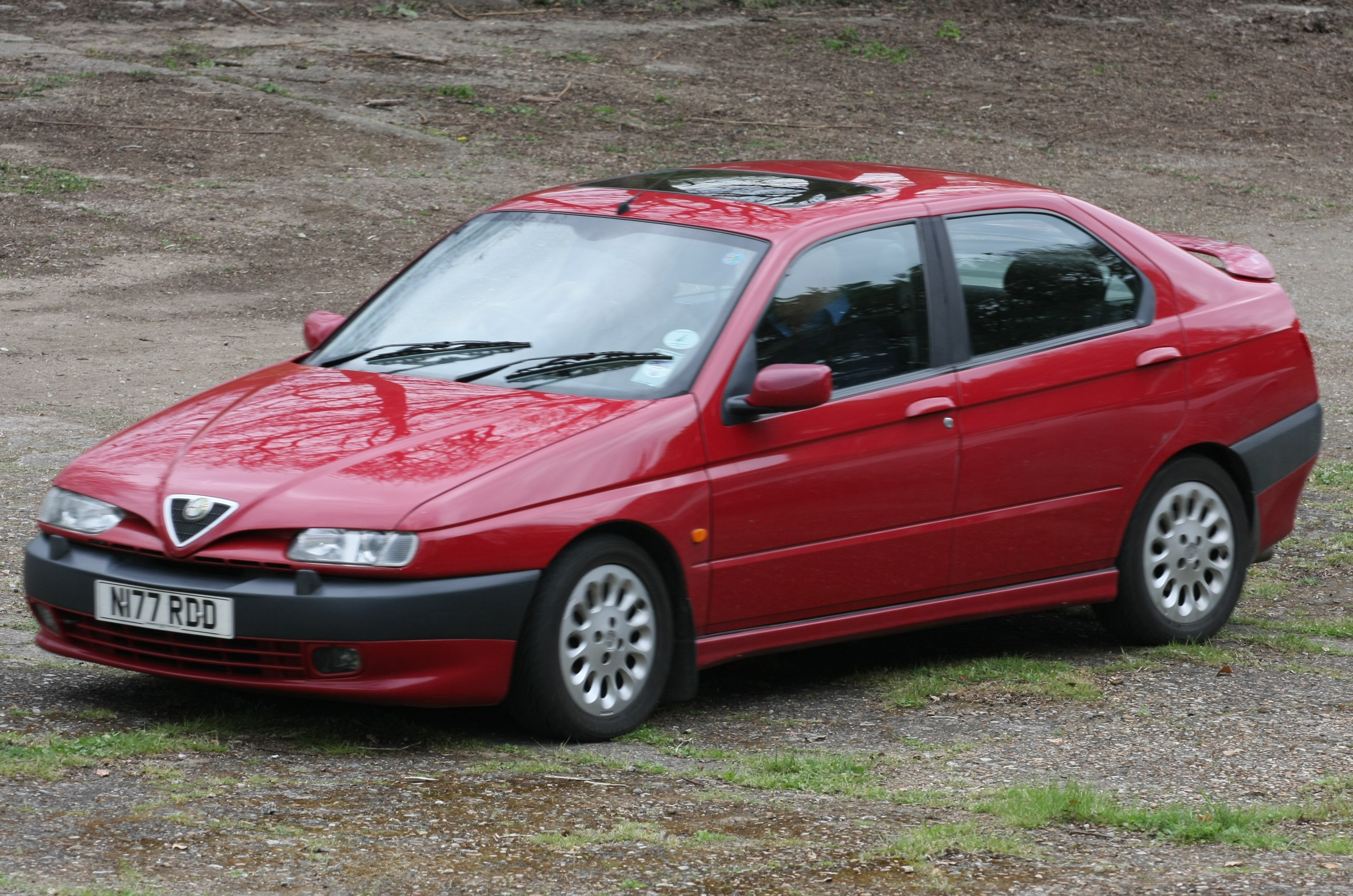 Auto Italia Spring car day Brooklands May 2010